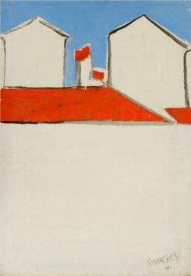 Opera del pittore futurista Sante Monachesi